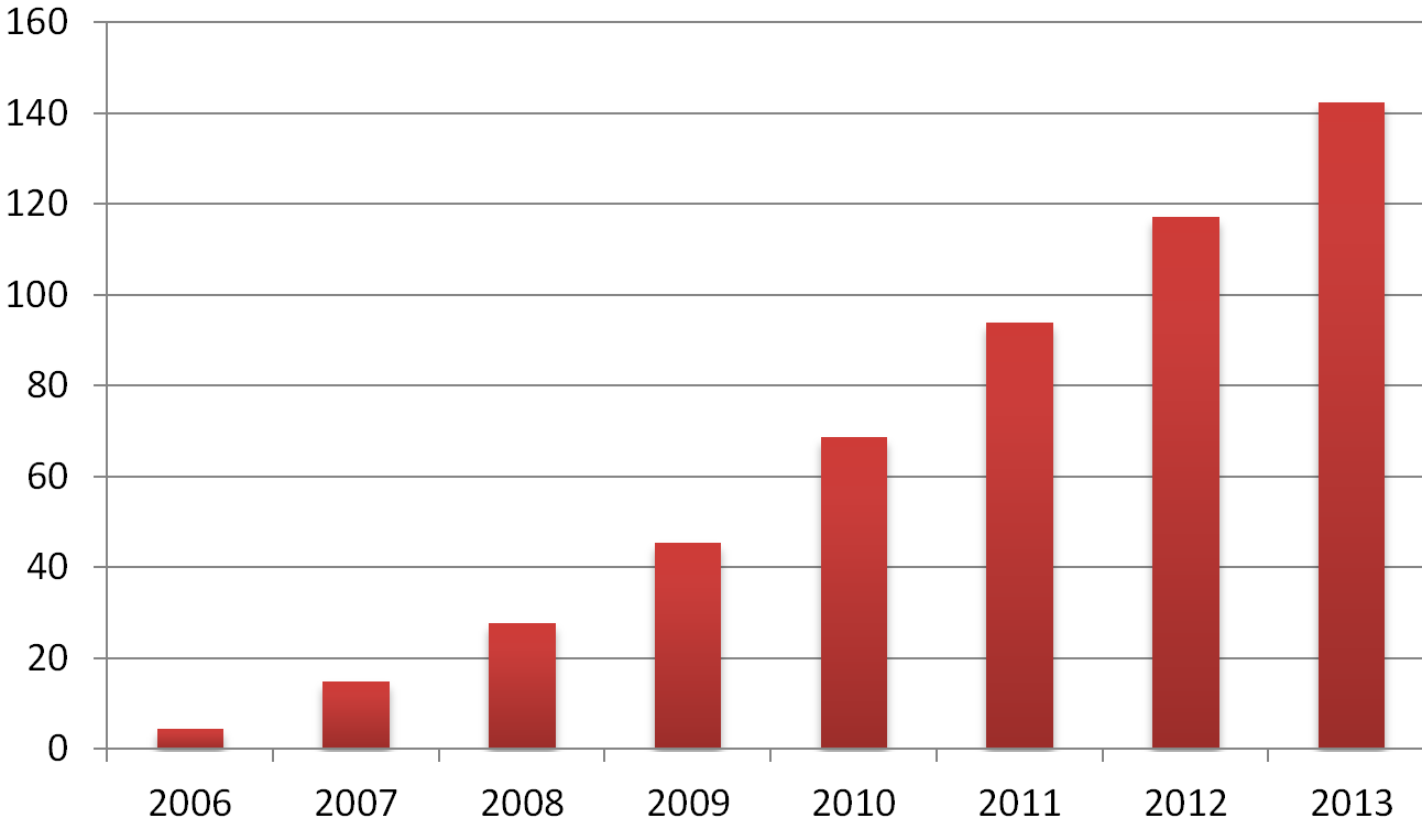 Transacties ideal 2006-2012, in miljoenen